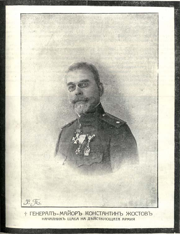 Портрет на ген.-майор Константин Жовков